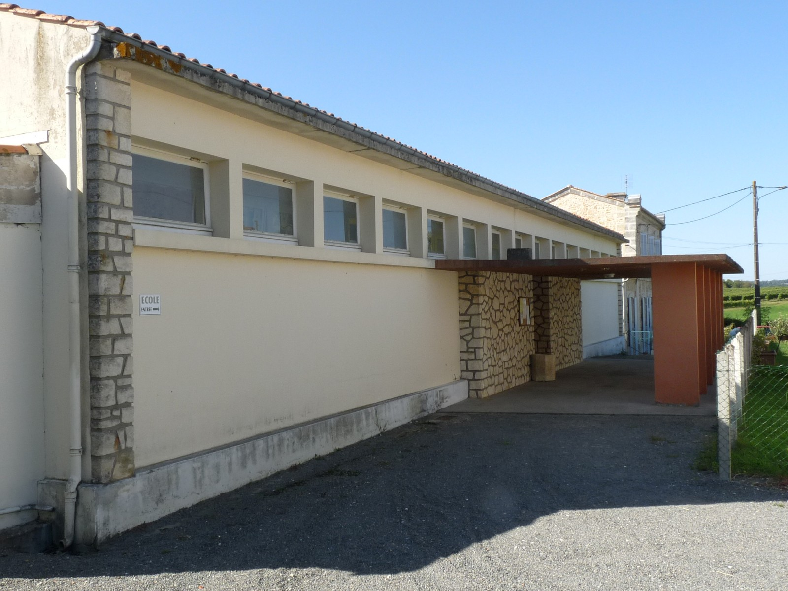 Ecole de Chamouillac, Charente-Maritime, France